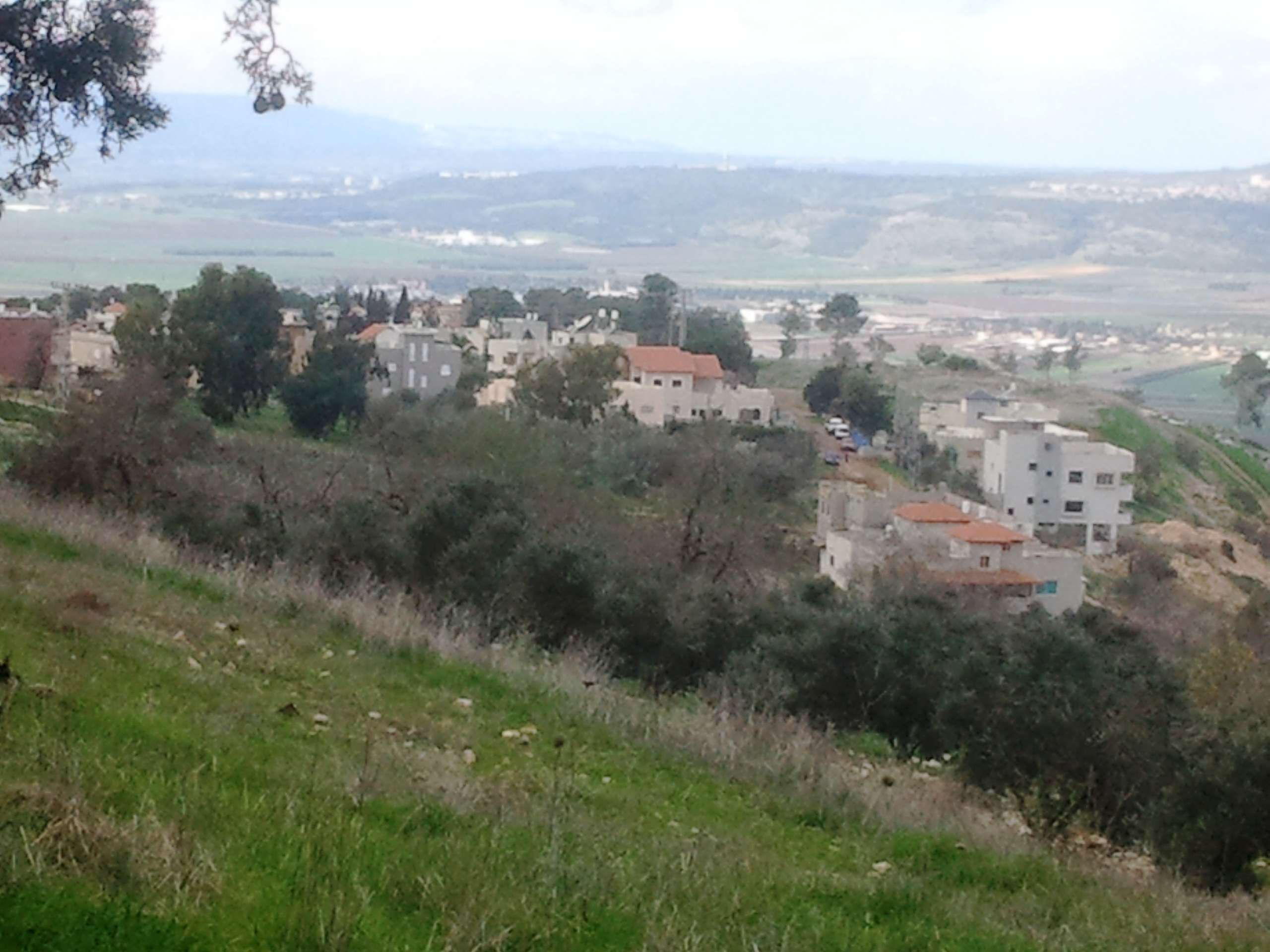 דחי (בערבית: الدحي) הוא כפר ערבי בגליל התחתון ליד שכונת גבעת המורה שבעפולה והשייך למועצה אזורית בוסתן אל-מרג'.